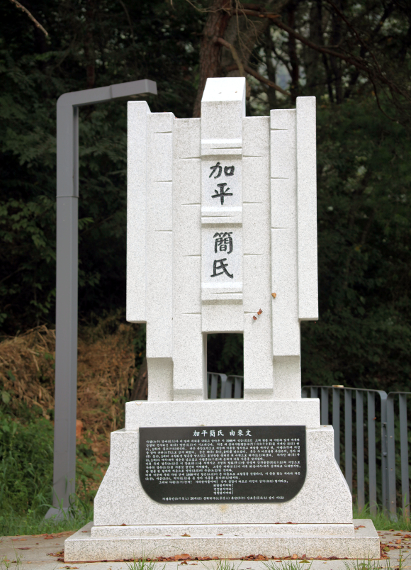 대전뿌리공원 가평간씨 조형물